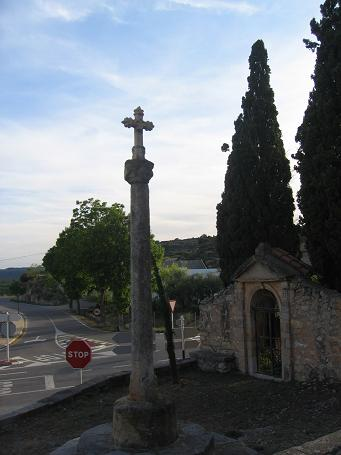 Piló del Calvari de Sucaina (Alt Millars, Castelló)